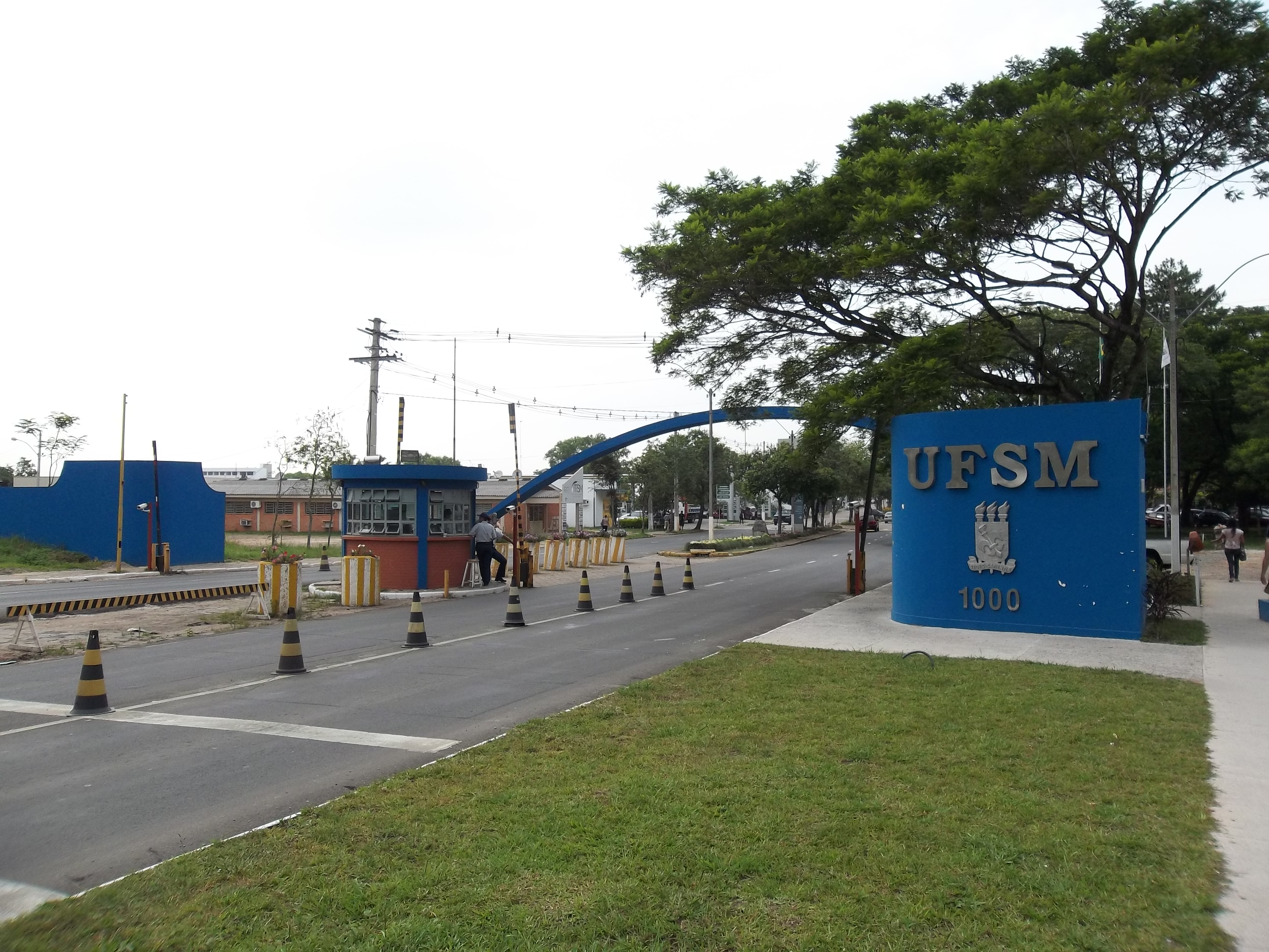 Entrada da UFSM